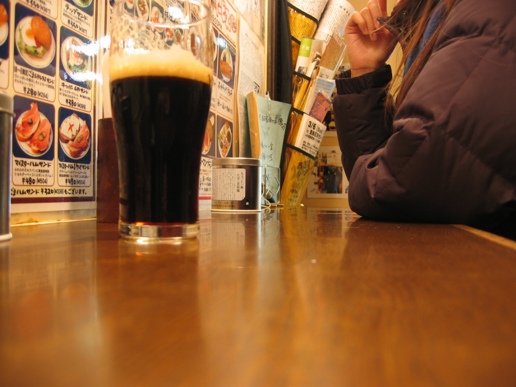 ビア&カフェBERGの立ち飲み用カウンター（東京・新宿区新宿3-38-1、新宿駅東口改札最寄りの「ビア&カフェBERG」[1]）